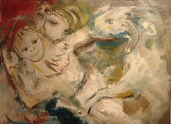 Nen amb Cabra